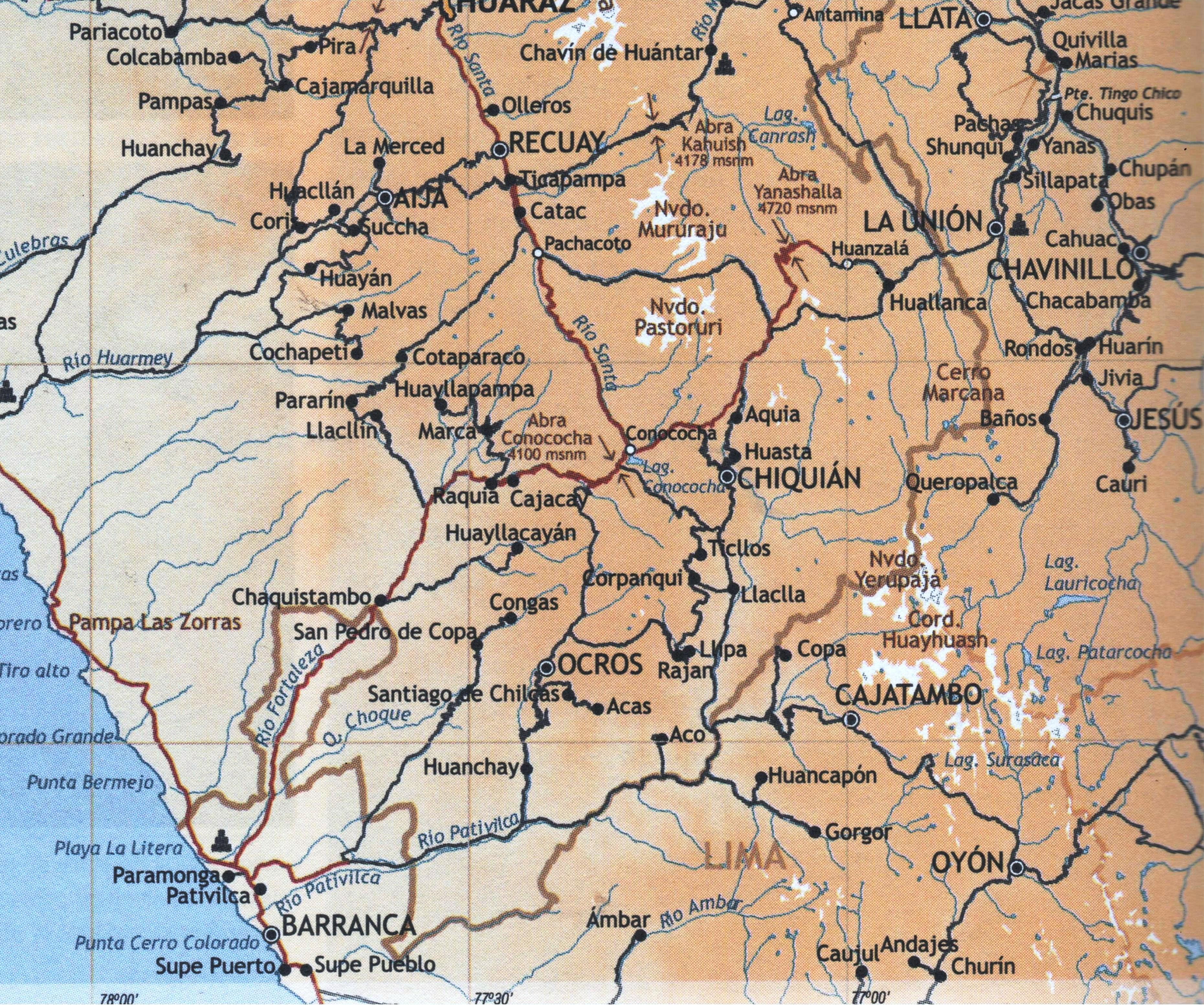 Mapa víal de La Unión.